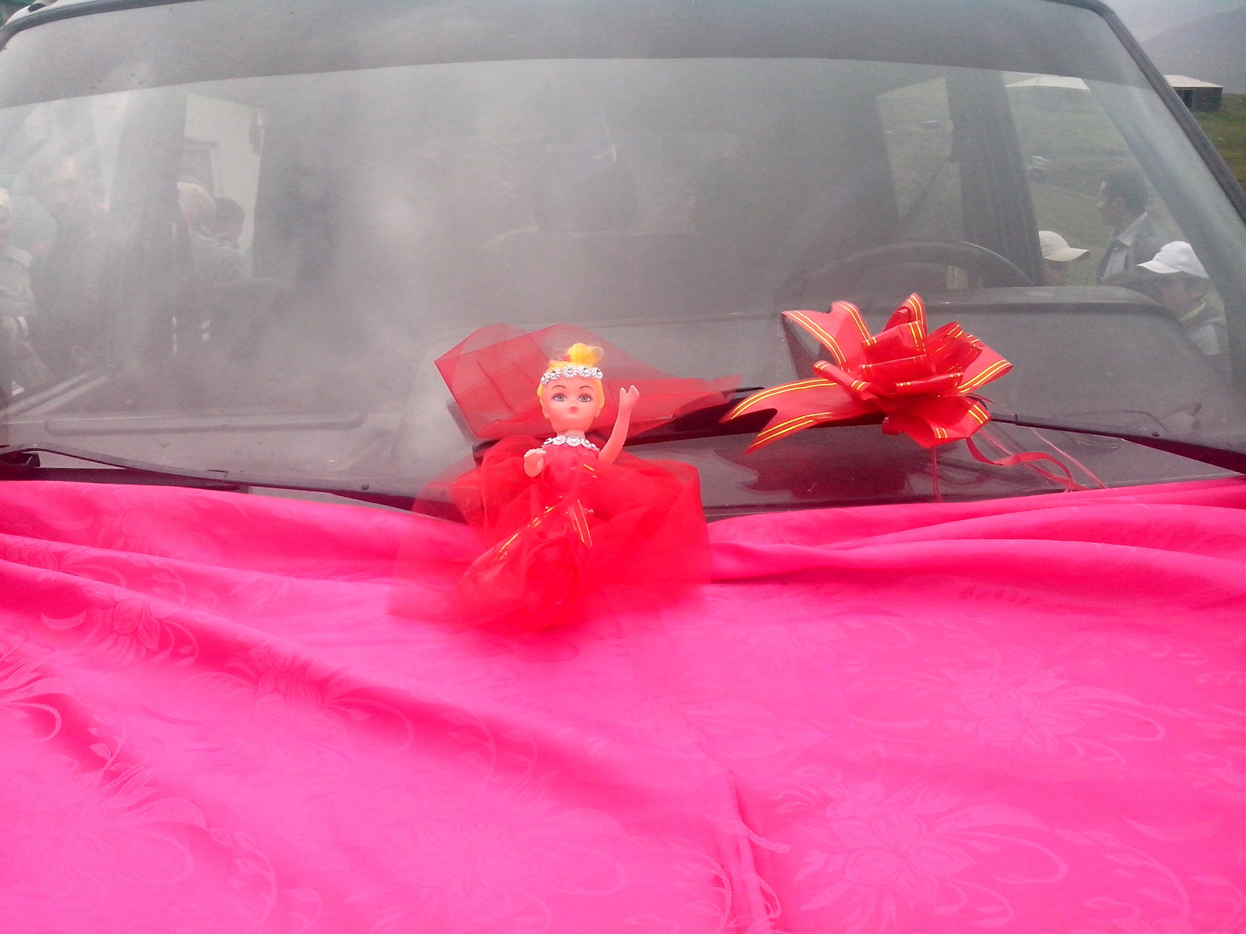 Gəlin maşınında Gəlin kuklası. Şəkil ceklilər Haput kəndindən gəlin gətirərkən Haput kəndində çəkilmişdir.